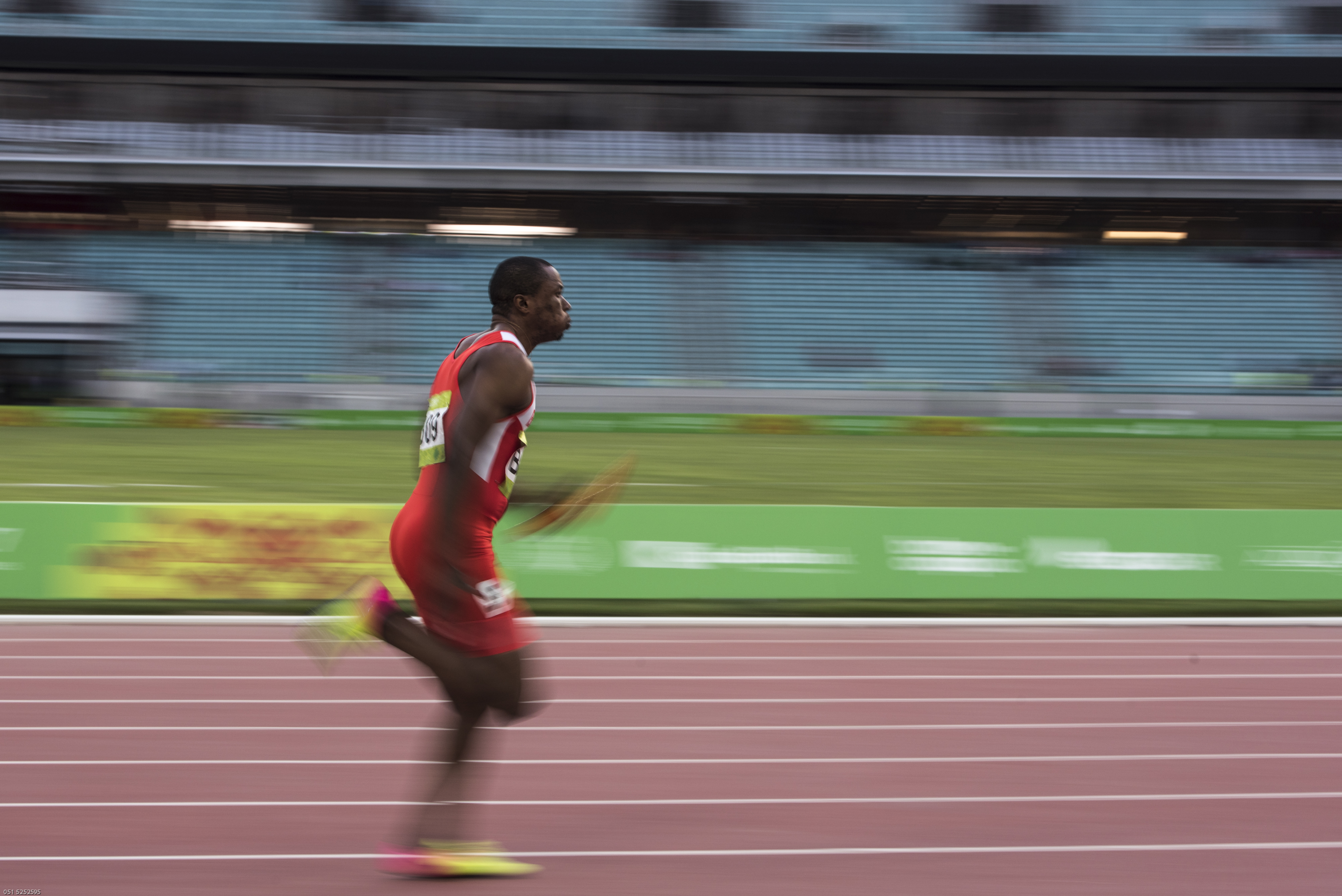 The Islamic Solidarity Games (Arabic: ألعاب التضامن الإسلامي) is a multinational, multi-sport event. The Games involve the elite athletes of the Organisation of the Islamic Conference. The Islamic Solidarity Sports Federation (ISSF) is the organisation that is responsible for the direction and control of the Islamic Solidarity Games.[1] Baku 2017 Islamic Solidarity Games